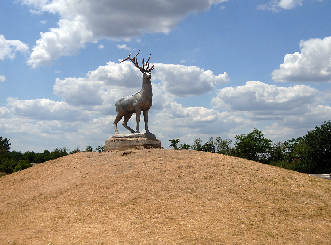 Скульптура оленя на повороте с трассы М-18 на Кирилловку. Акимовский район Запорожской области, Украина